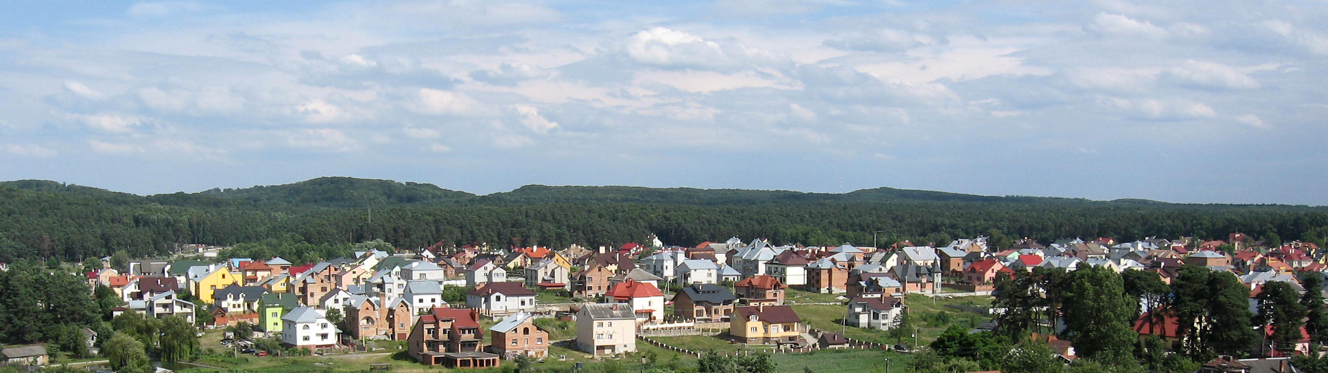 Панорама коттеджного поселка в БрюховичахПГТ в составе Львова